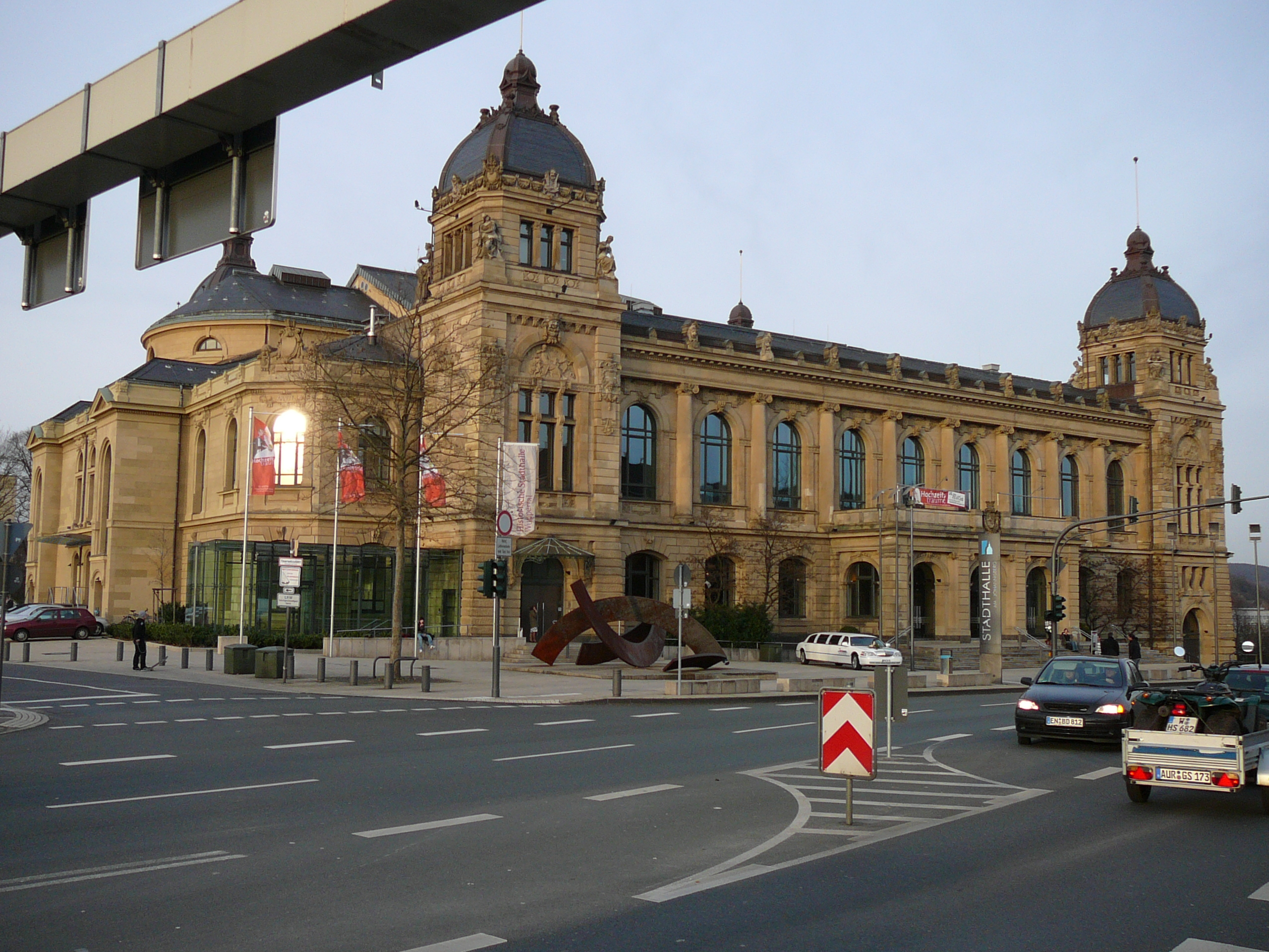 Johannisberg, Wuppertal / sculpture Raumsegmente Rondo (1999) by Alf Lechner/Germany